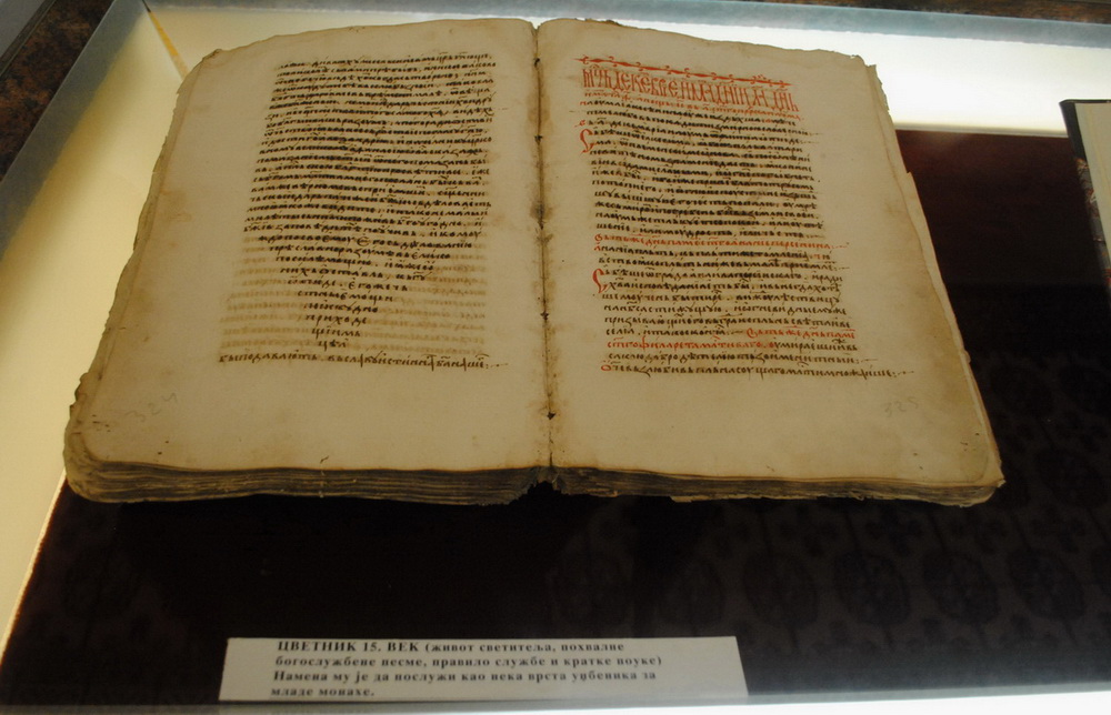 Srpski (latinica): Cvetnik, vrsta udžbenika za mlade monahe. Napisan u 15. veku. Čuva se u Riznici Srpske pravoslavne Crkve, pri Patrijaršijskom dvoru, Sremski Karlovci